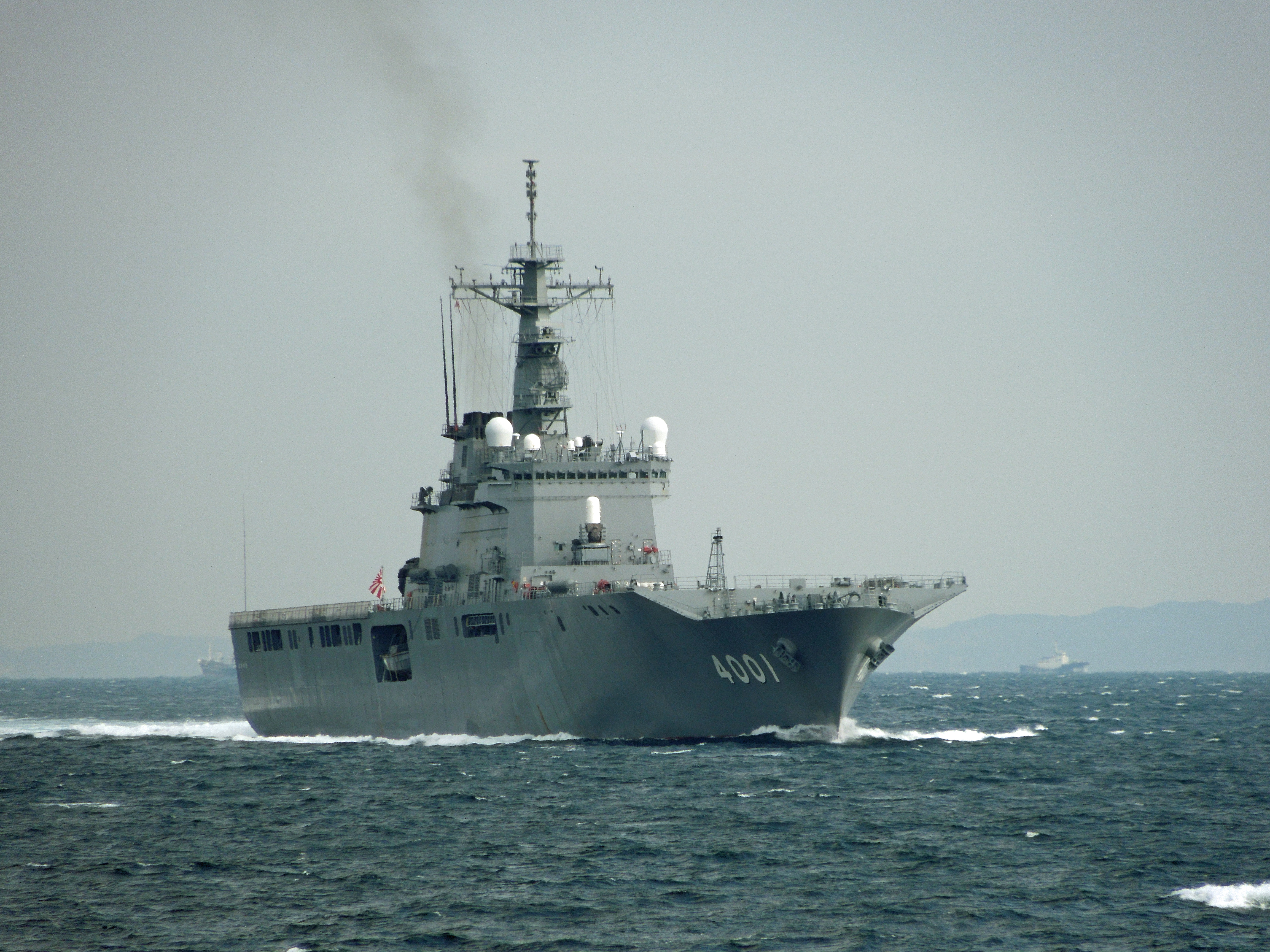 東京湾を南下中の「おおすみ」